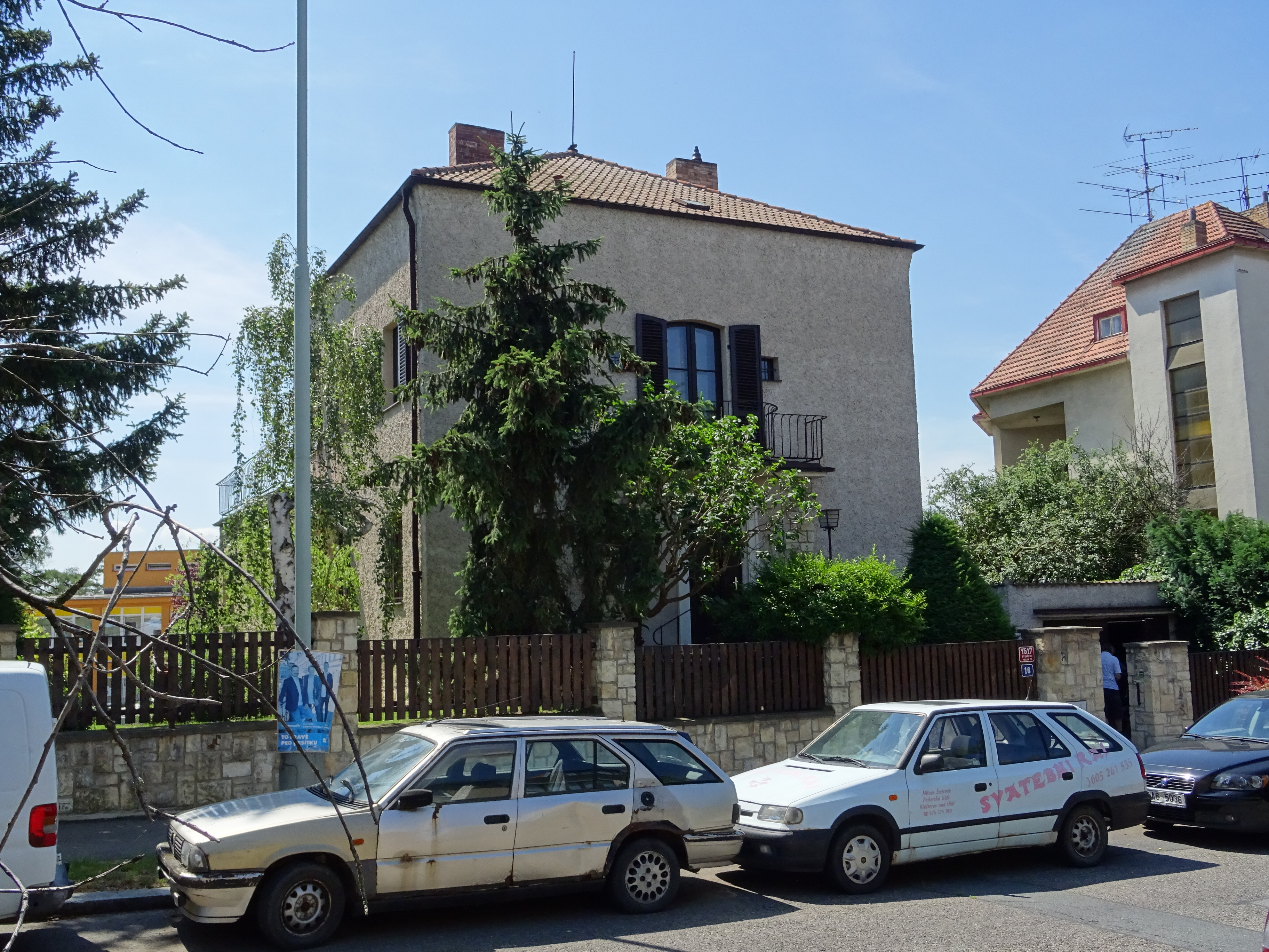 Bruno Rücker: vila U krbu 1517/16 (Útulná 1517/3), Praha - Strašnice